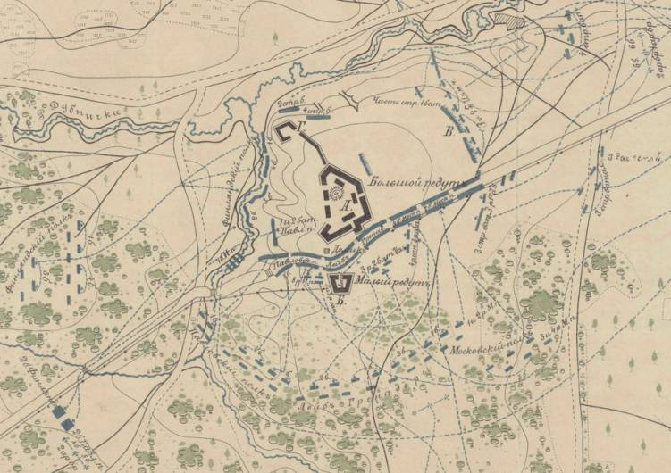 Карта на редутите при Горни Дъбник 12.10.1877 г.